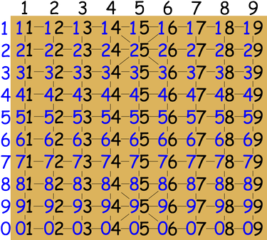 장기의 좌표